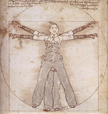 "Madonna vitruvio" hecho por Lesmack Meza Parente derivada de una obra bajo el dominio público: Hombre de Vitruvio.